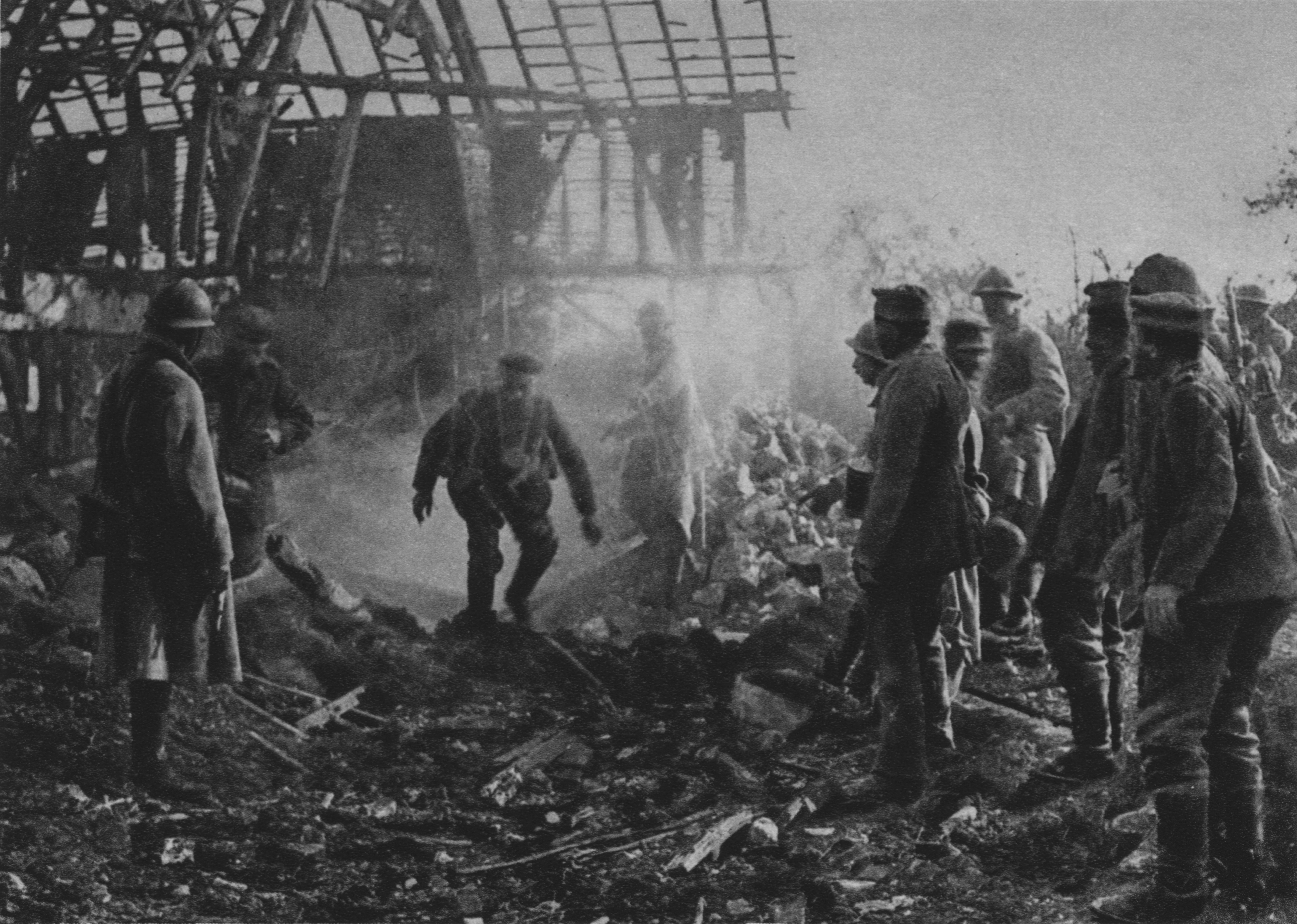 Mitten im Kamp um Cantigny (28. Mai 1918). Gegen die furchtbarste moderne Waffe, den Flammenwerfer, kämpfte selbst der Tapferste vergebens. - Dicke Rauchschwaden brennenden Flammöls erfüllen die Luft. In Haltung und Geste prägt sich die ungeheure Spannung des grauenvollen Moments. Eine zweite derartige Aufnahme aus den mörderischen Kämpfen existiert nicht.